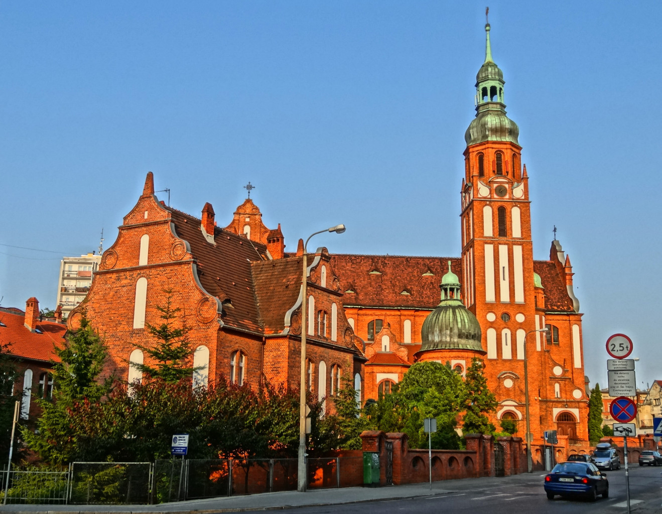 Kościół p.w Świętej Trójcy w Bydgoszczy